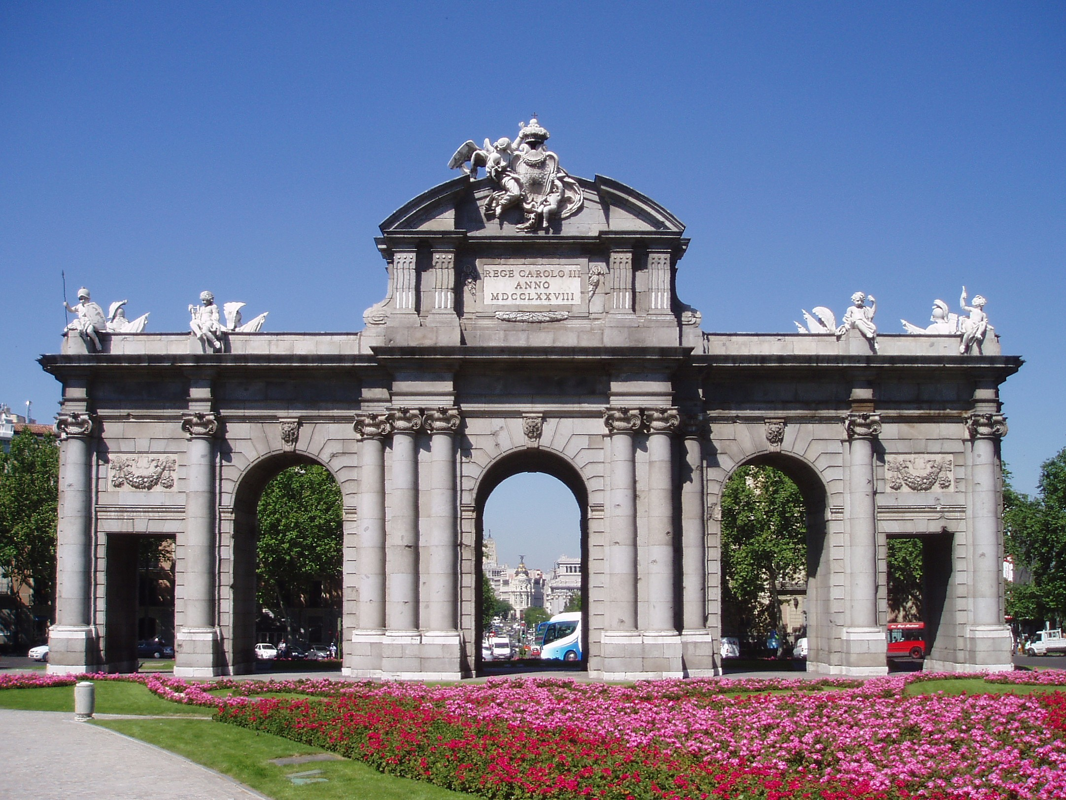 Puerta de Alcalá, Madrid (Spain).